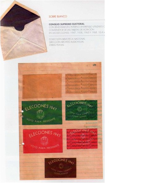 Boleta de votación de las elecciones de 1947 en Venezuela